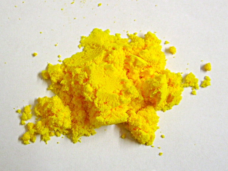 Cer(IV)-sulfat.